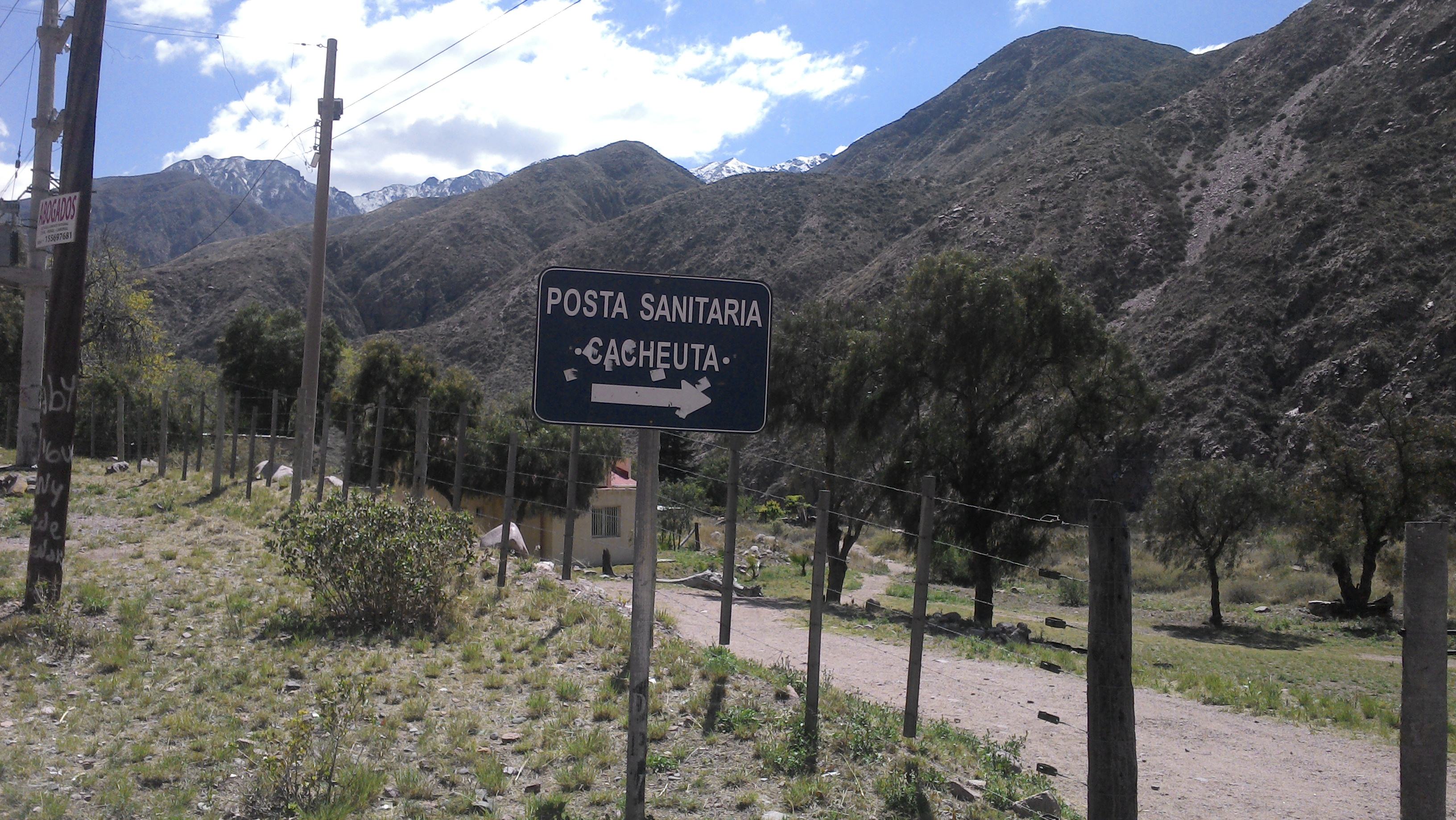 Luján de Cuyo, Mendoza, Argentina